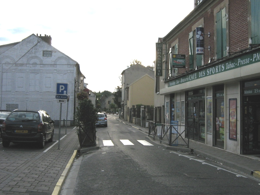 Rue Aristide Briand, voie centrale du vieux village d'Osny.